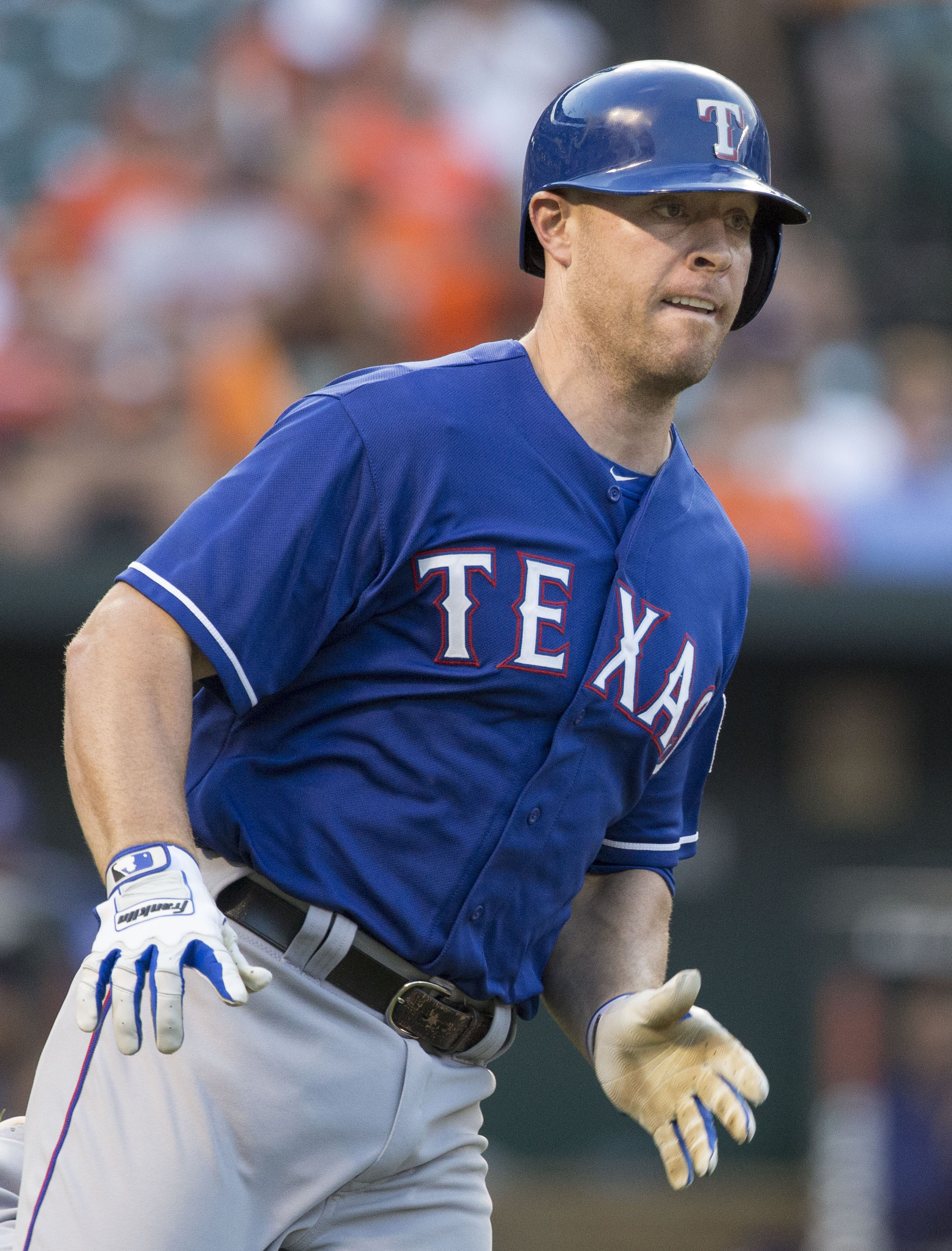 Chris Gimenez